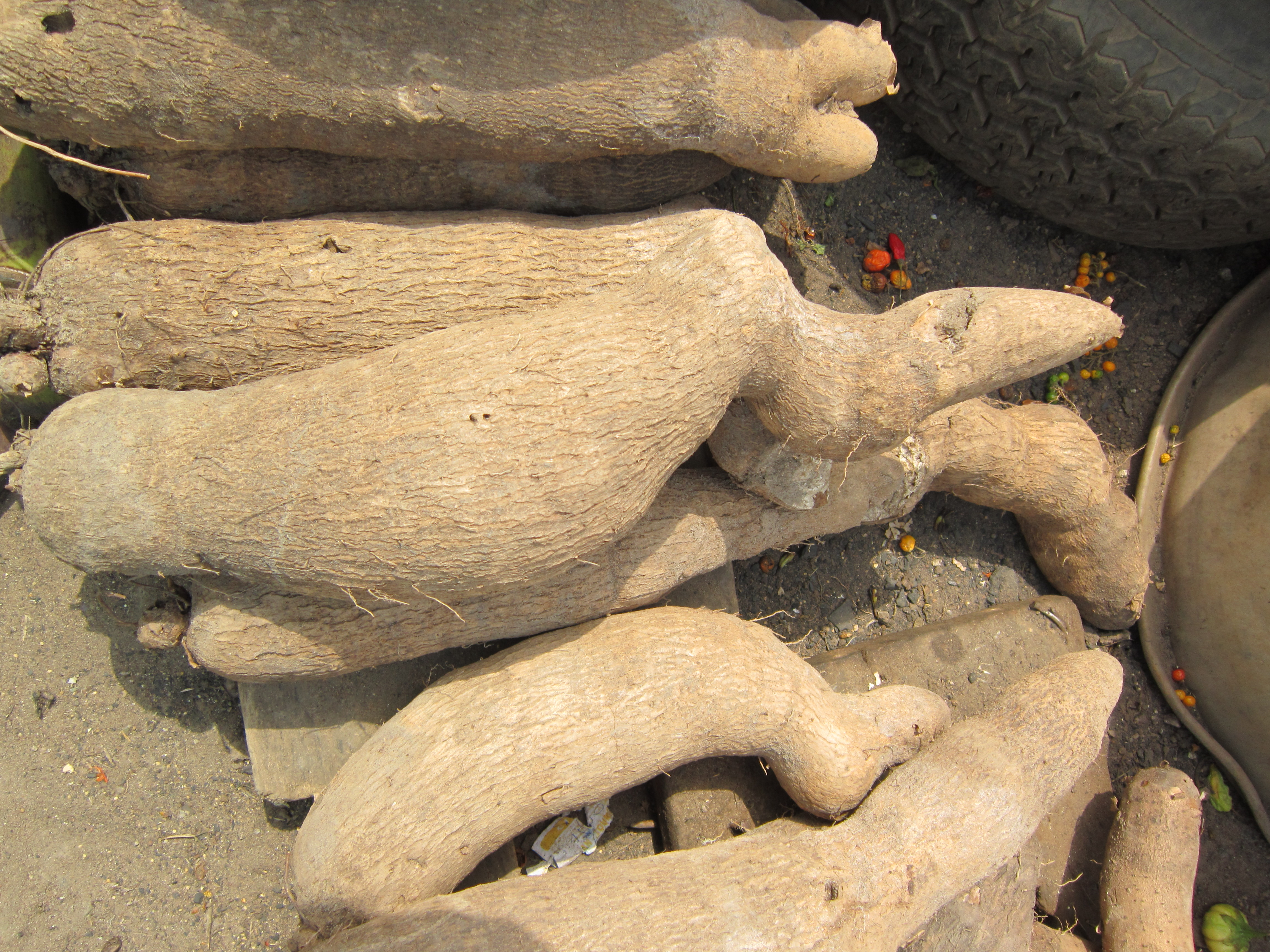 ignames précoce